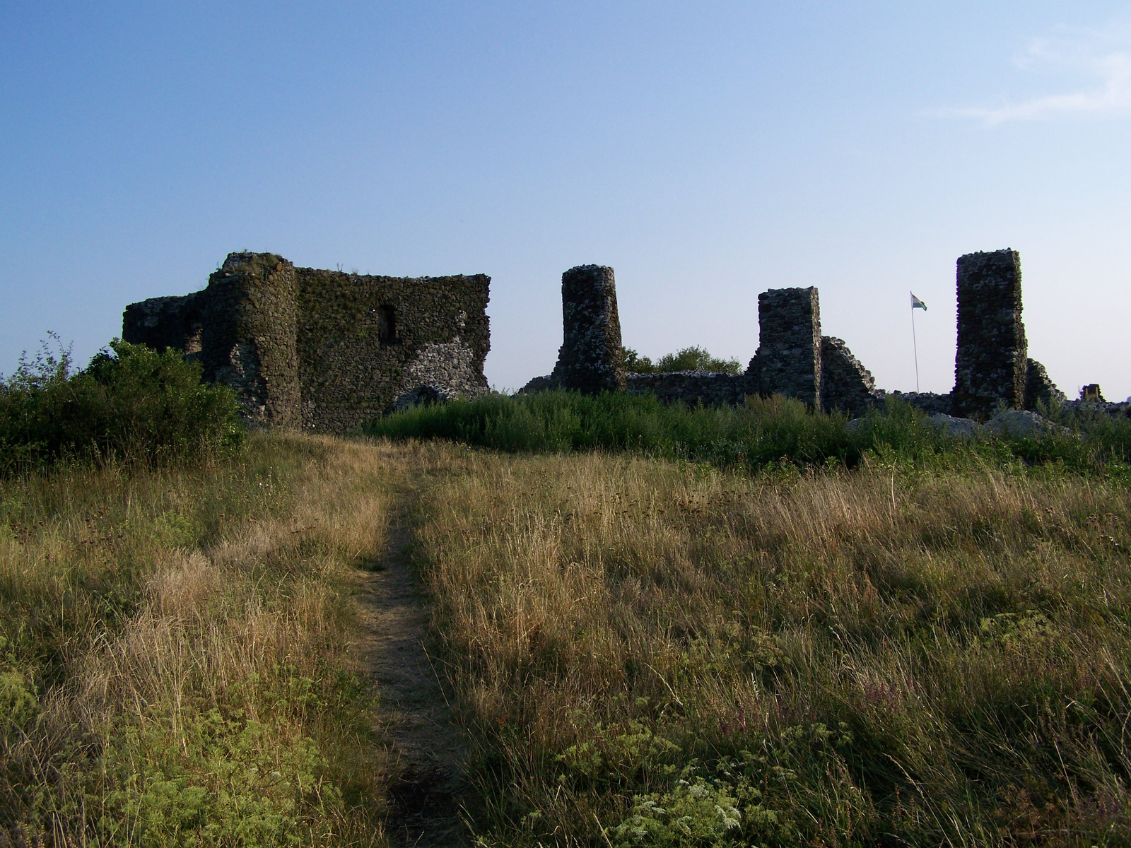 Várrom (Gyulakeszi, CSOBÁNCHEGY) This is a photo of a monument in Hungary. Identifier: 9885